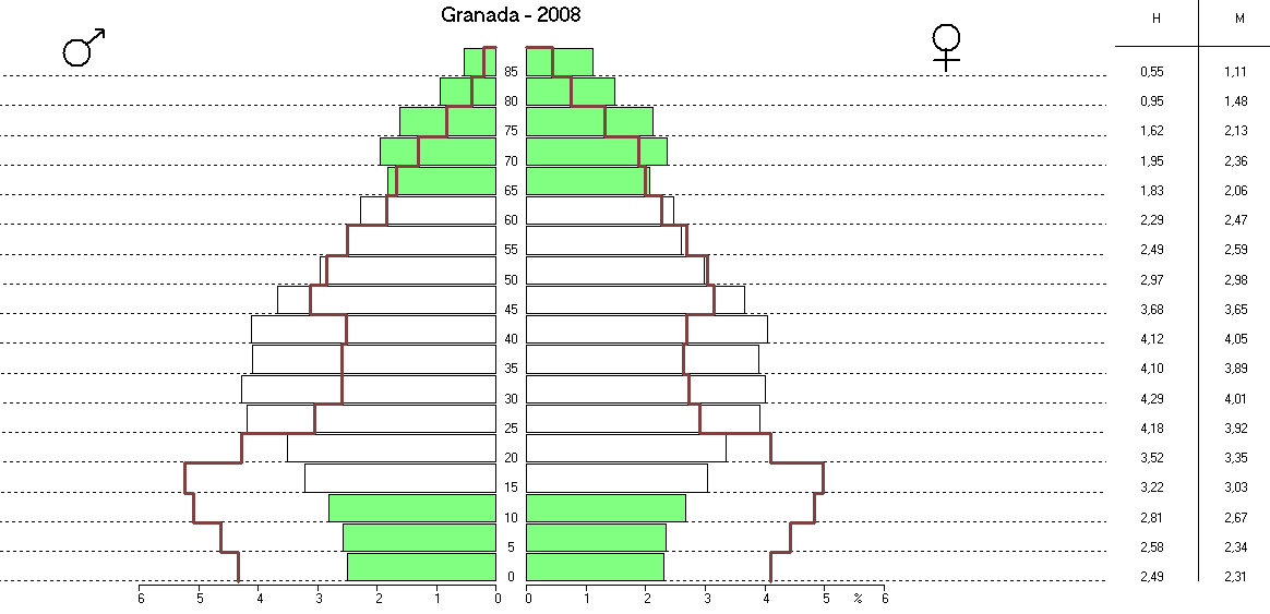 Pirámide de población de la provincia de Granada en el año 2008, comparada con 1981